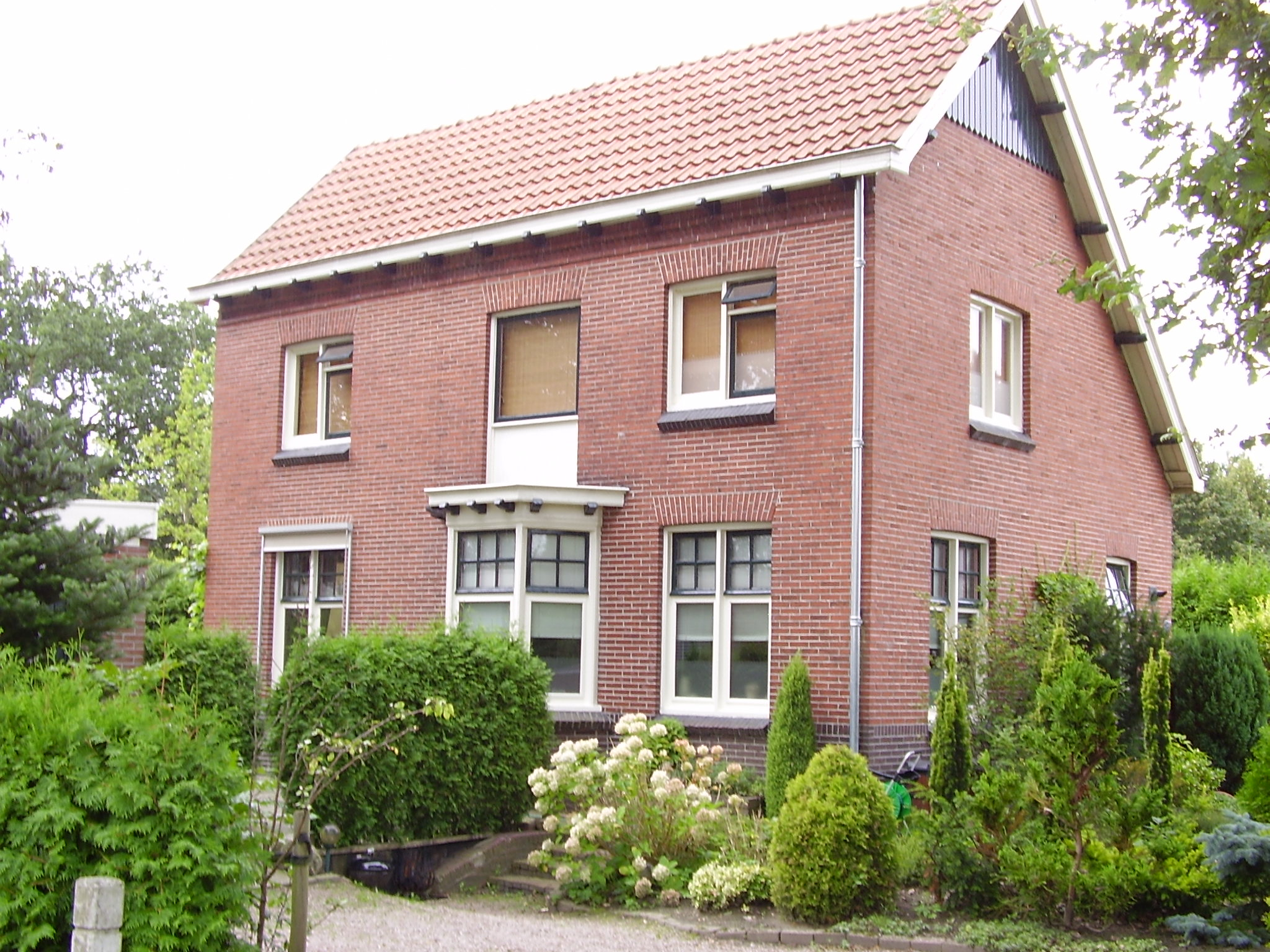 Voormalig tramstation van de OG in Jipsinghuizen. Former trainstation of the OG in Jipsinghuizen. Eigen foto van Marco Roepers